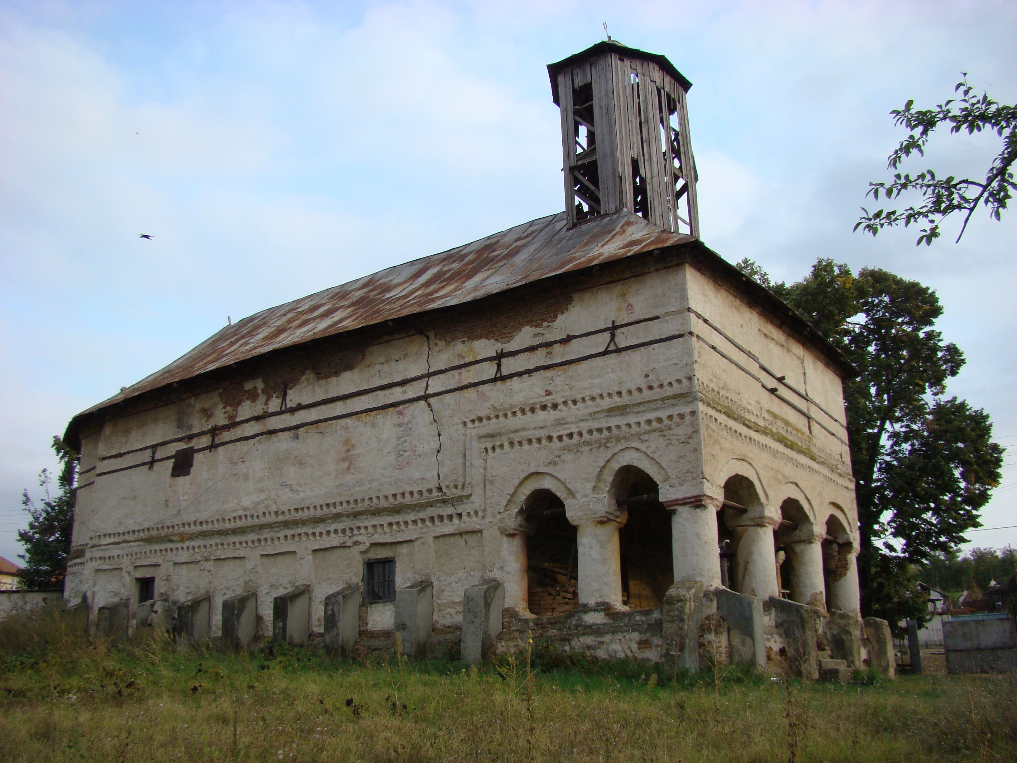 Biserica monument „Sf.Apostoli Petru și Pavel” din Viașu, Mehedinți